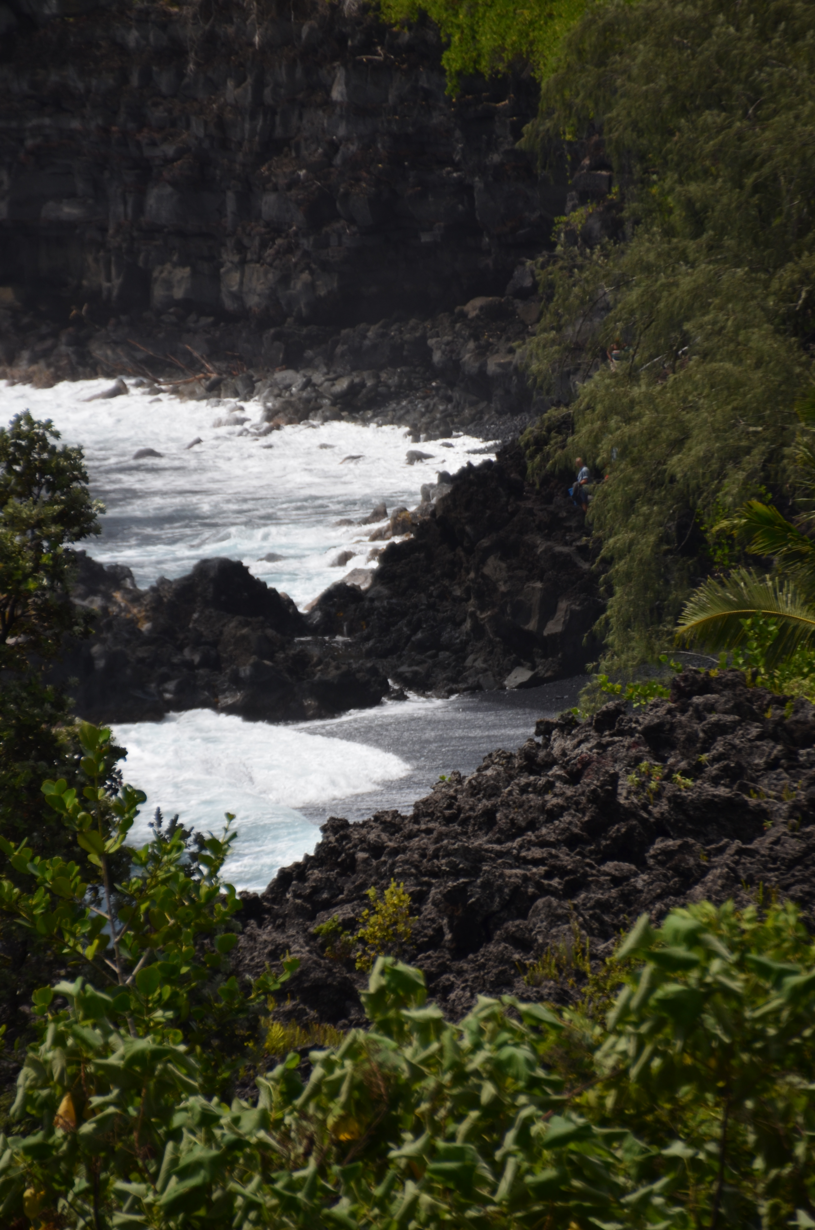 Kehena Beach